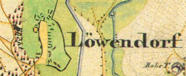 Löwendorf, Stadt Trebbin, Brandenburg, Deutschland, Urmesstischblatt Blatt Trebbin 3745, von 1840